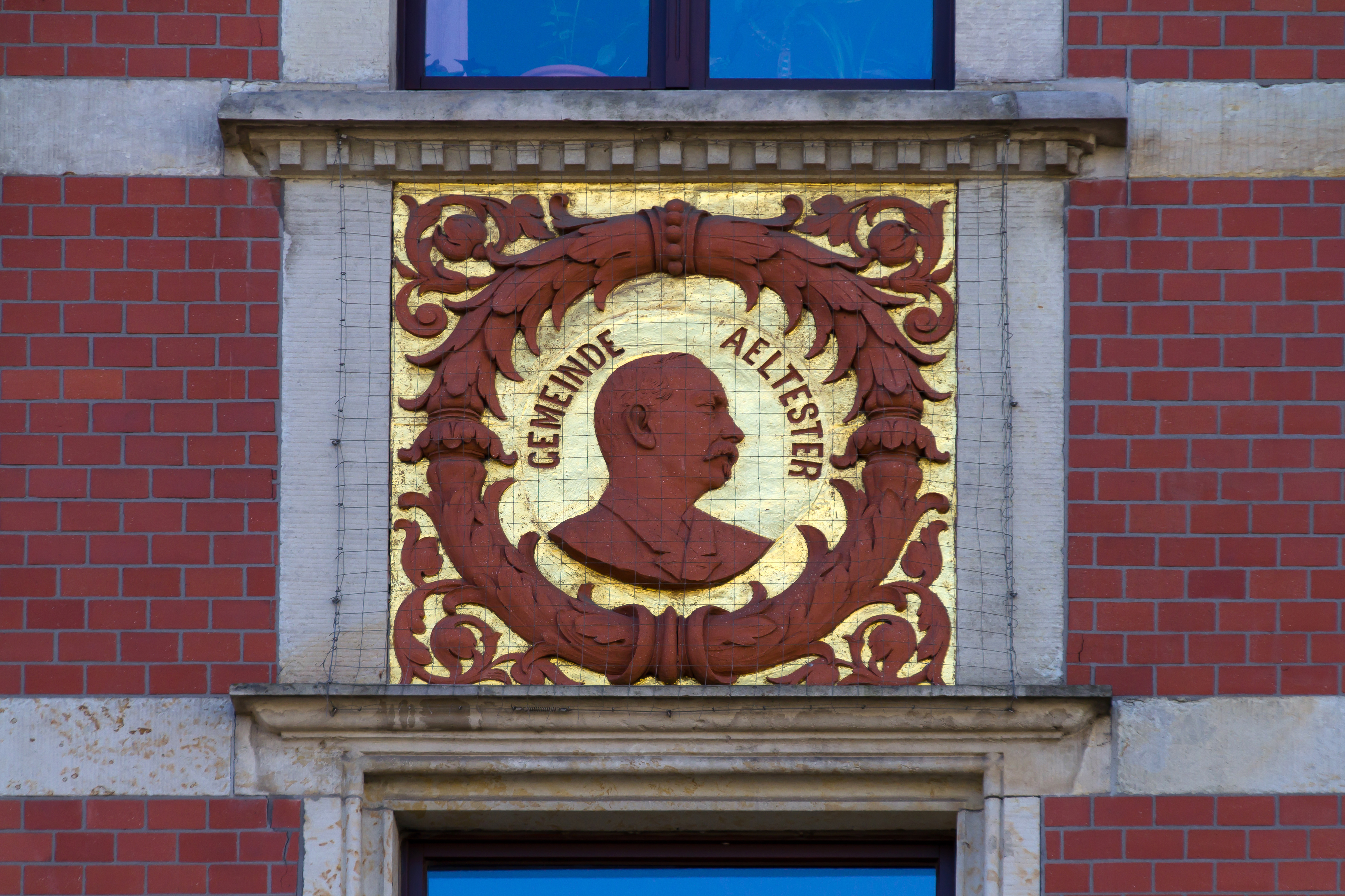 Rathaus Pieschen Detail